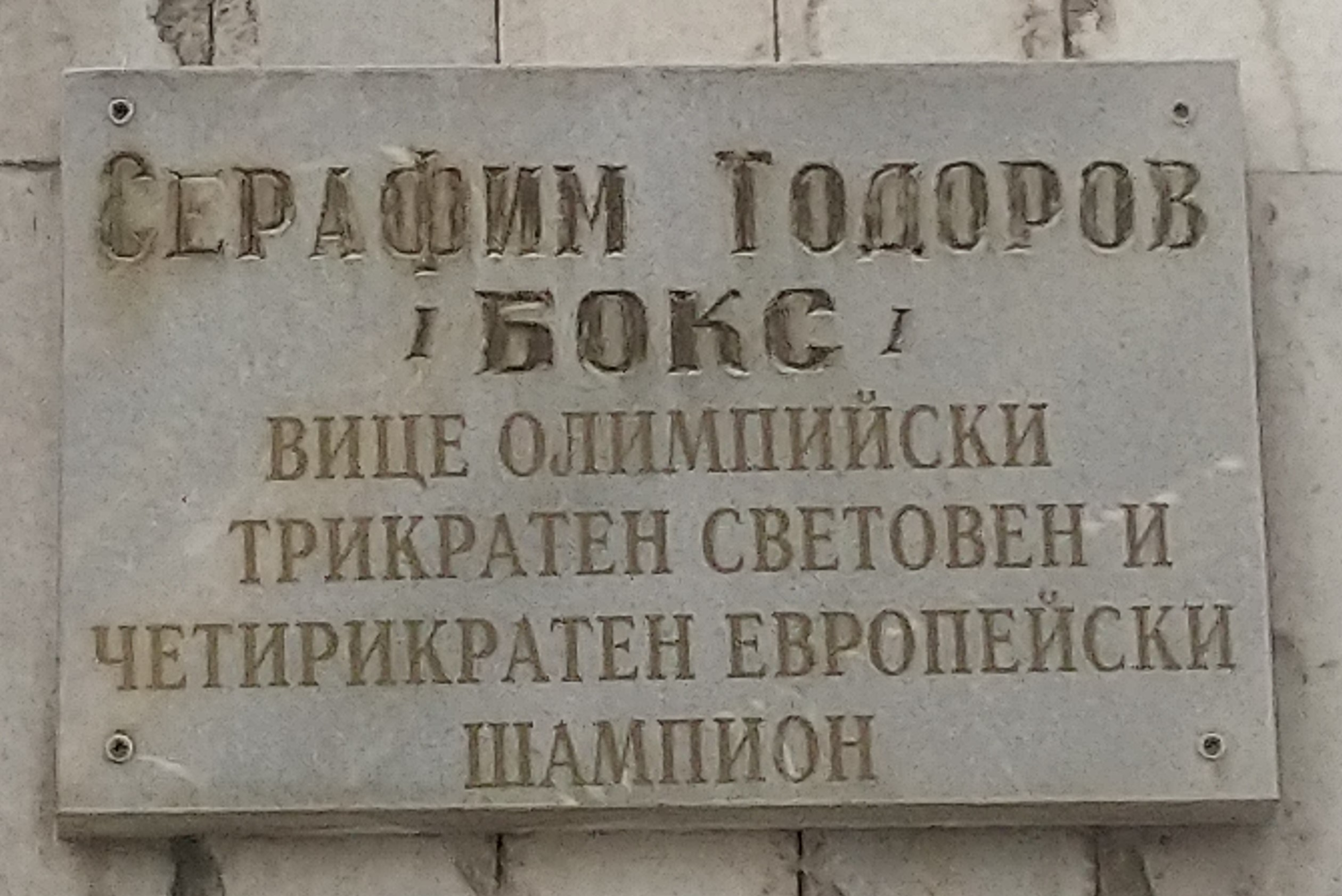 Паметна плоча на боксьора Серафим Тодоров на фасадата на спортна зала "Васил Левски", Пазарджик